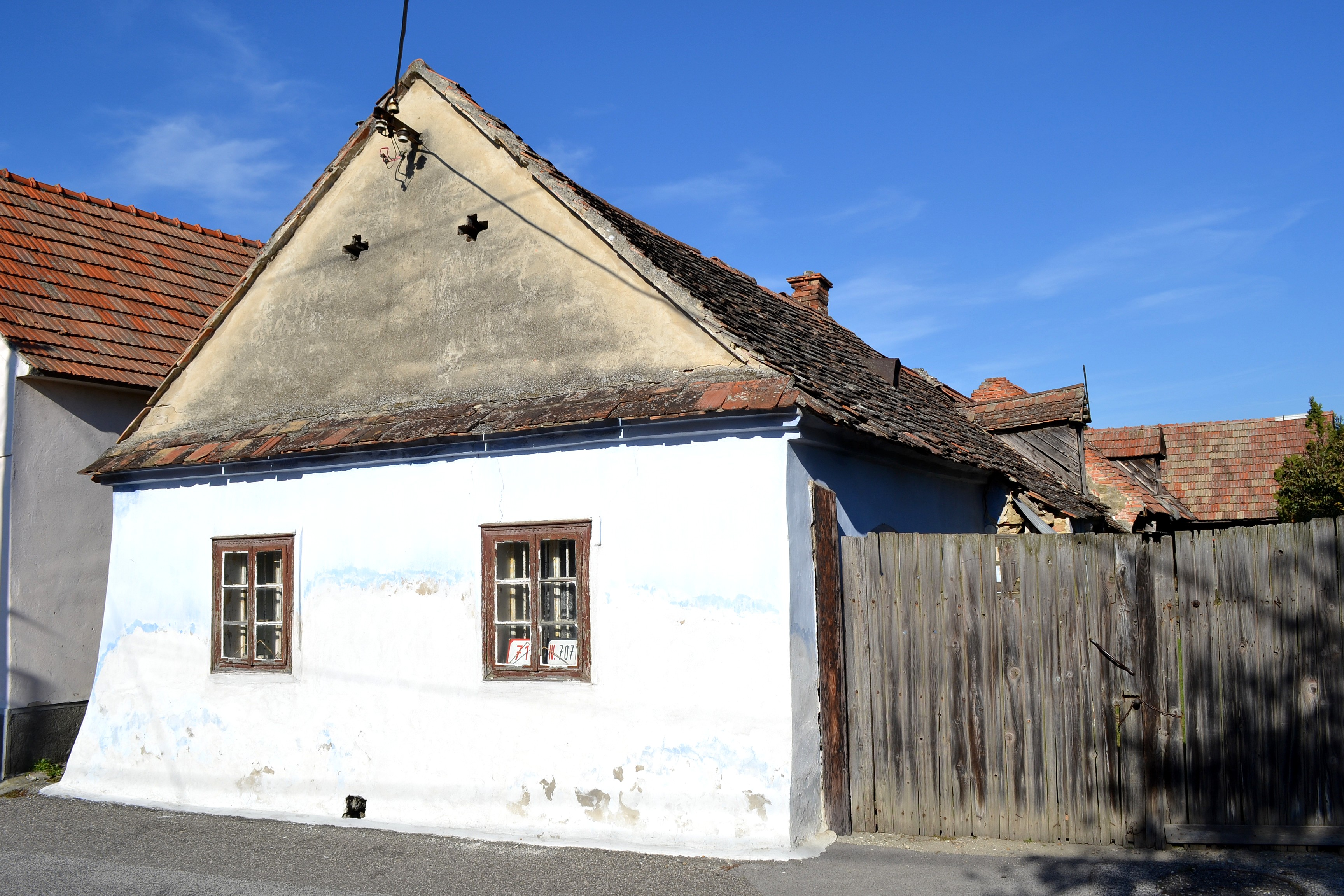 Bratislava-Záhorská Bystrica, Ul. čsl. tankistov č. 71